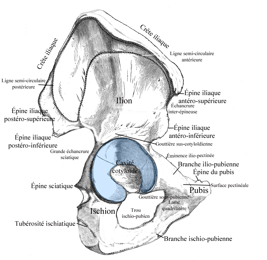 Repères sur la surface externe de l'os coxal